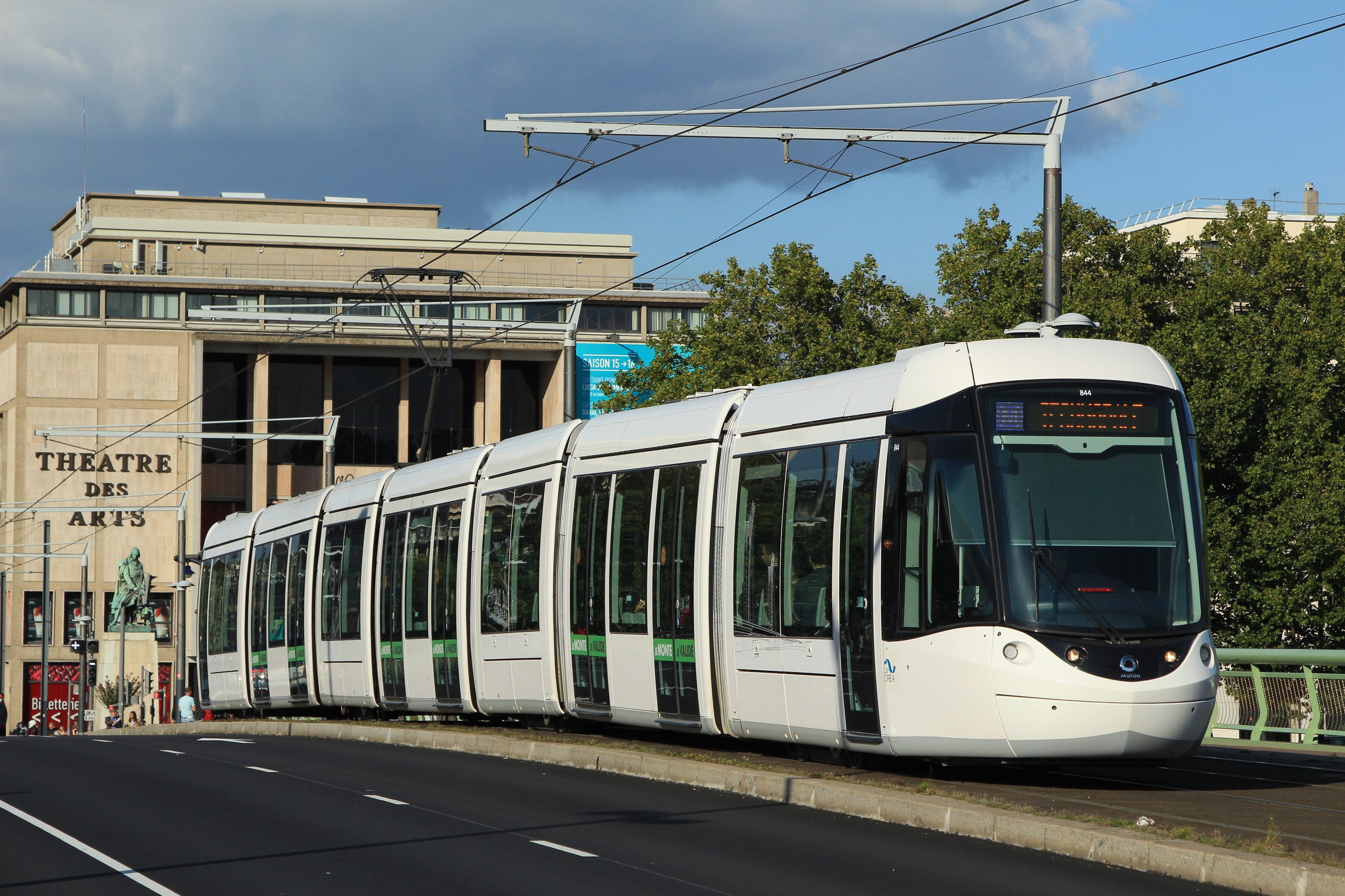 Rame Citadis n°844 du tramway (métro) de Rouen, sur le pont Jeanne d'Arc.